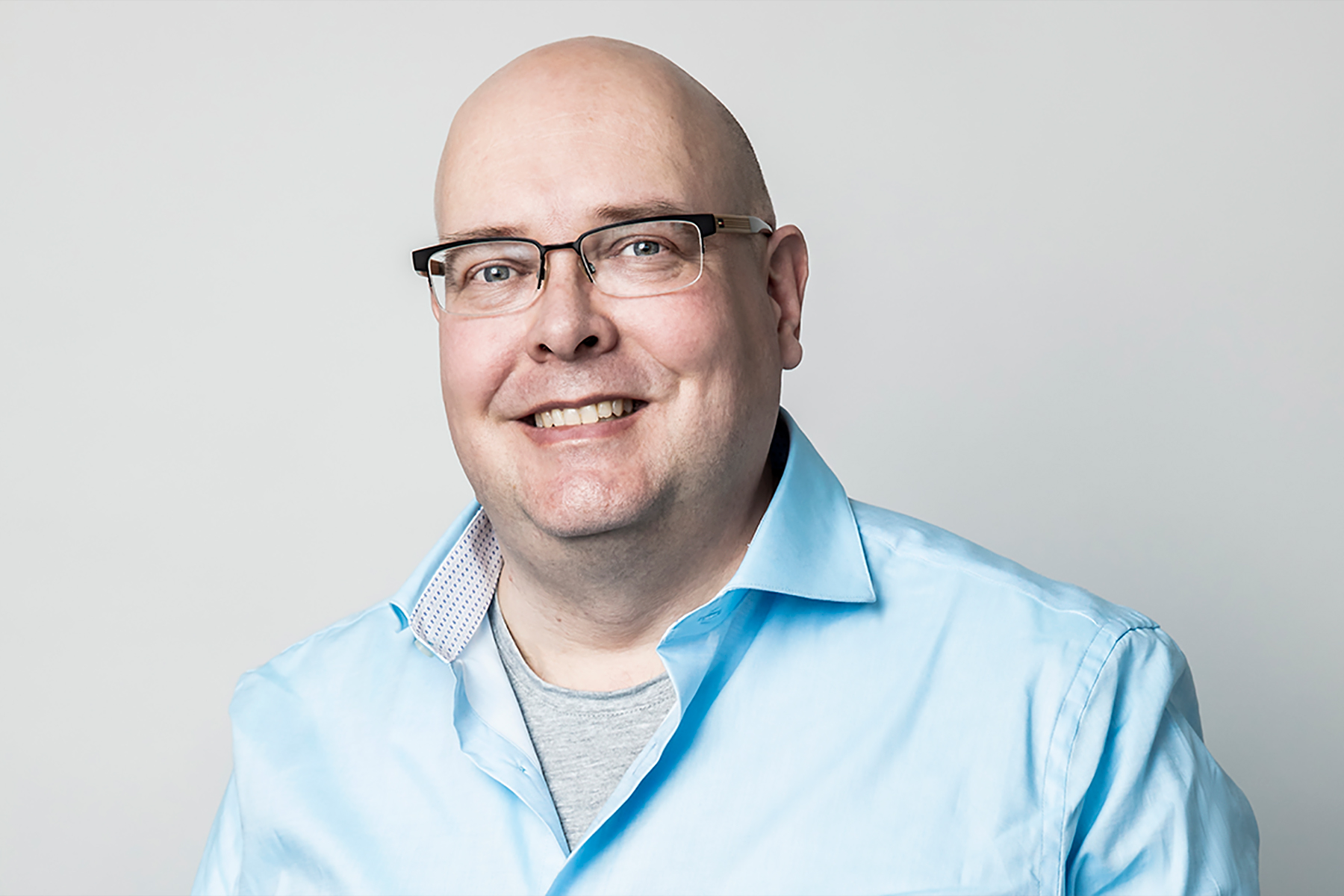 Magnus Kolsjö i mars 2019